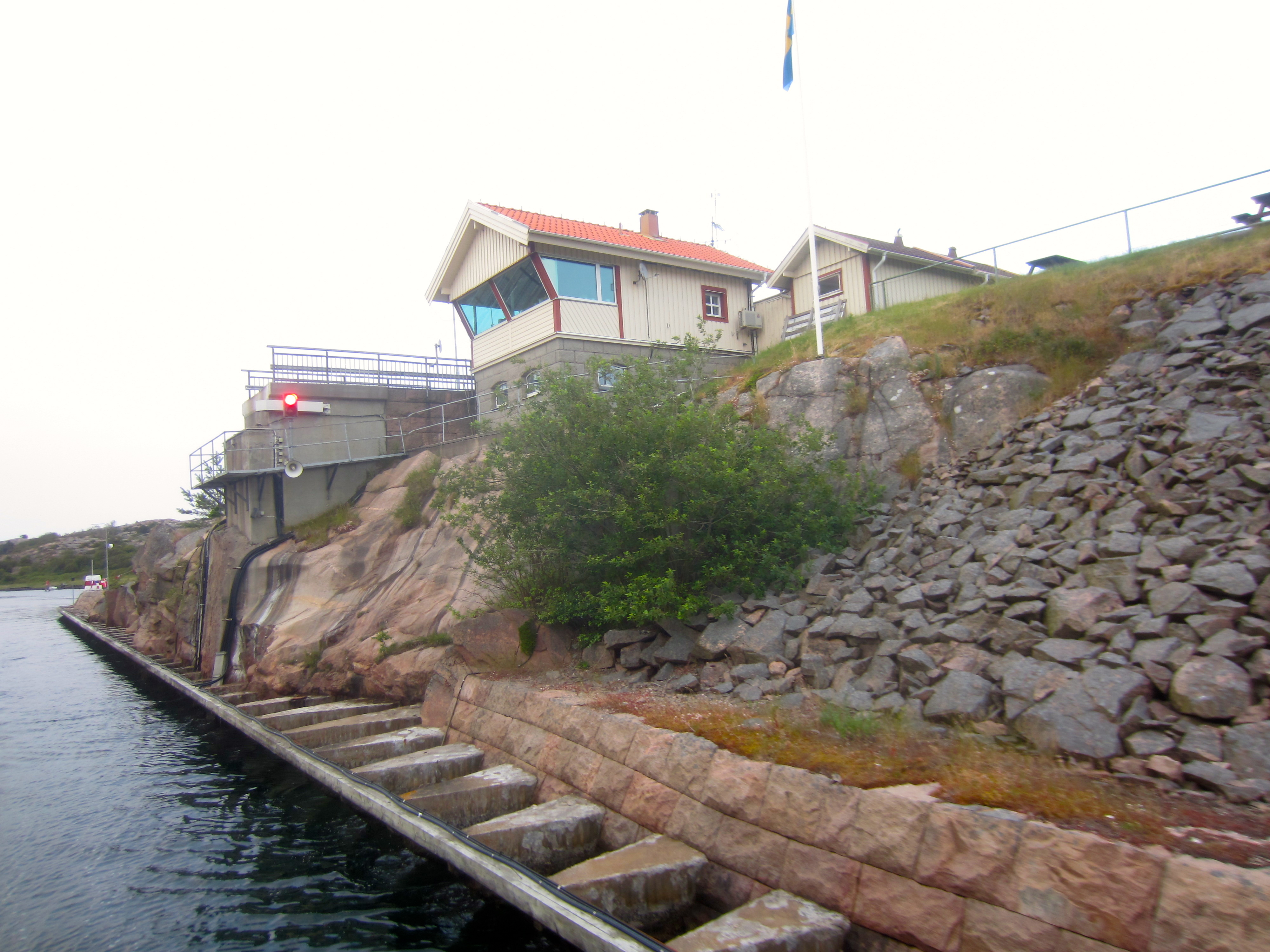 Brovakten, Sotenäskanalen.